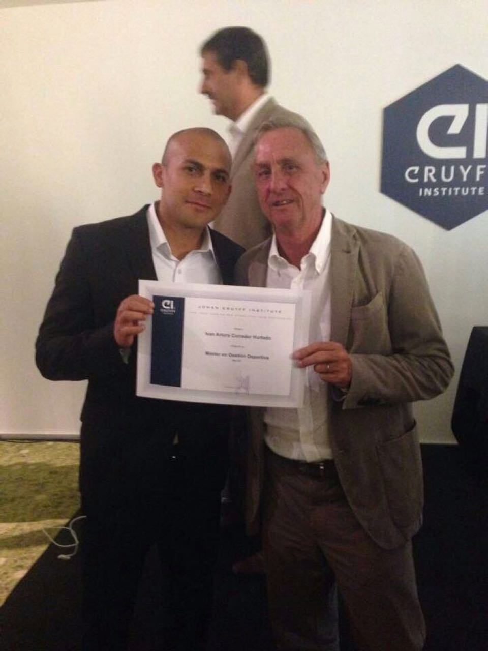 Iván Corredor recibiendo su master en Gestión Deportiva.